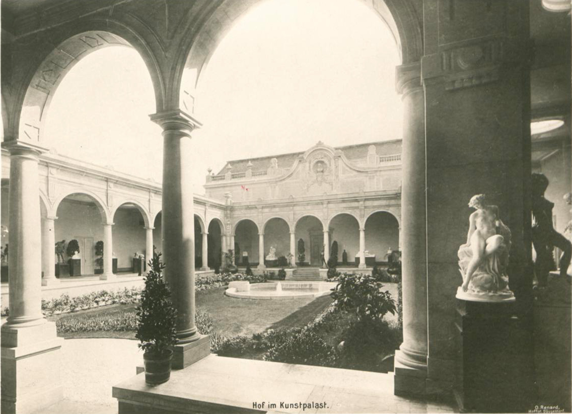 Kunstpalast, Innenhof im Kunstpalast, Foto Otto Renard, 1902. Ganz hinten, unter den Arkaden, die Marmorgruppe „Adam und Eva“ von Peter Breuer, heute im Florapark